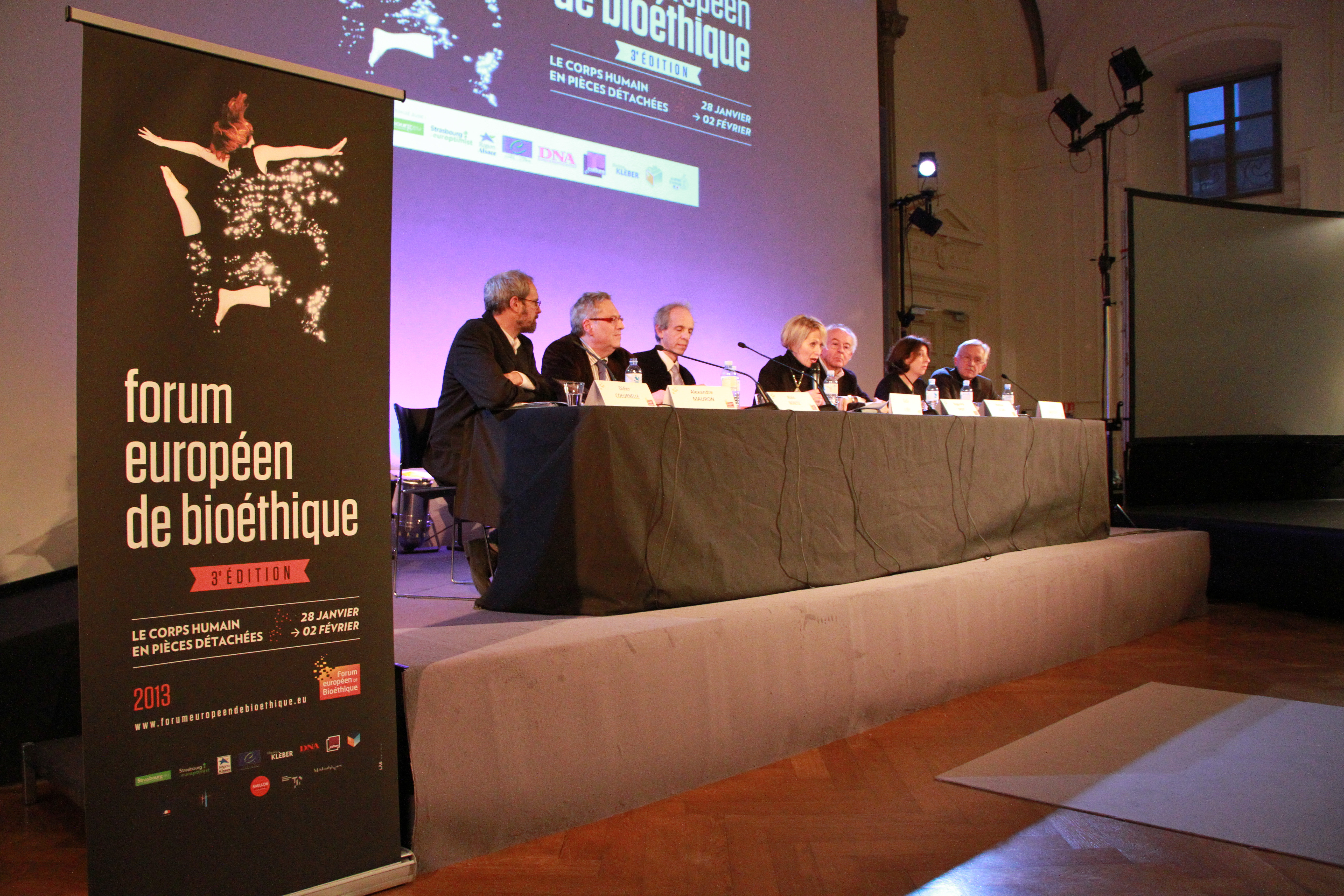 Strasbourg 3ème forum européen de bioéthique 28 janvier 2013